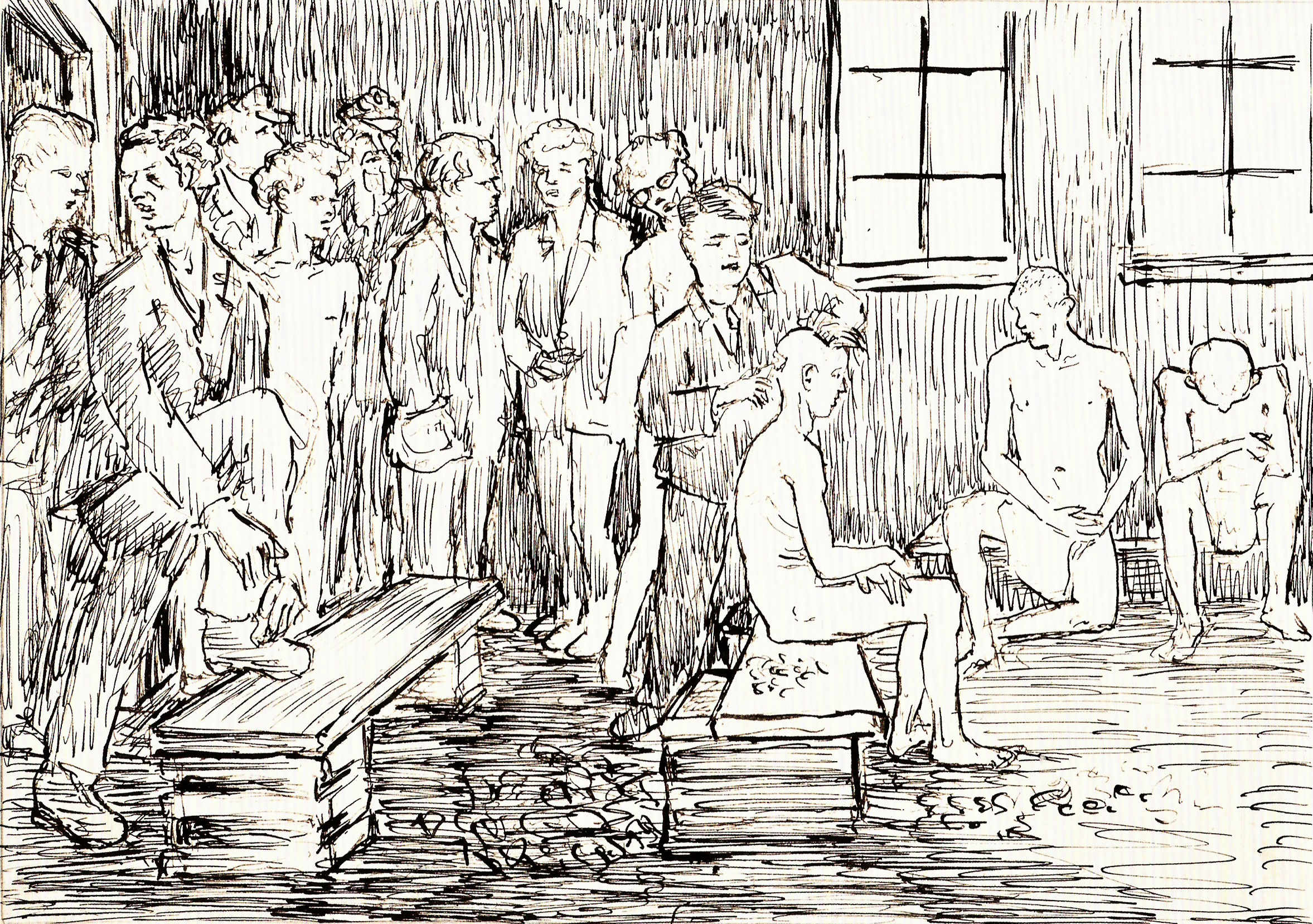 Haareschneiden im Kriegsgefangenenlager (Zeichnung)